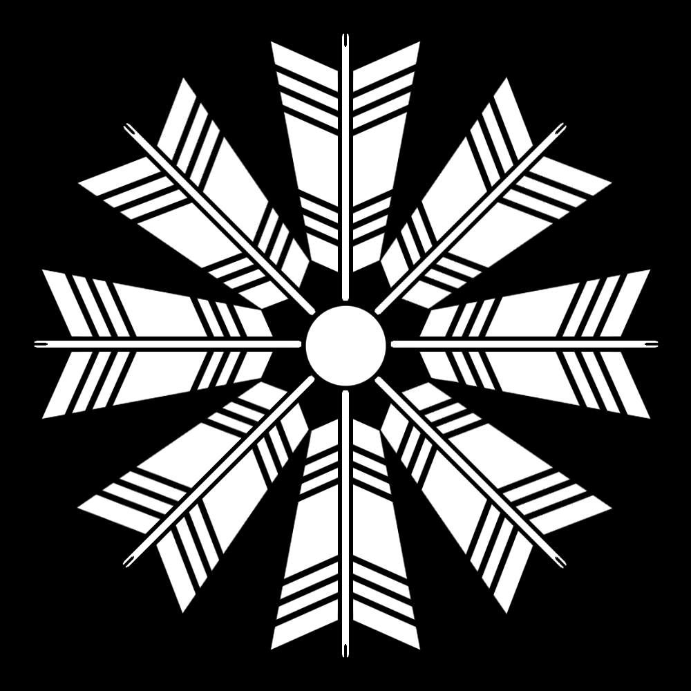 「八本矢車」紋（染抜）